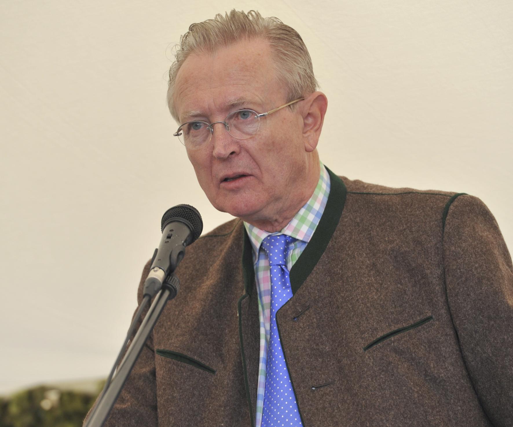 15. Station seiner Zukunftsenergientour: Windpark-Eröffnung in Bad Laasphe Auf der 15. Station seiner Zukunftsenergientour eröffnete NRW-Klimaschutzminister Johannes Remmel heute (11. September 2013) mit einer Delegation der EnergieAgentur.NRW einen Windpark in Bad Laasphe, der im Privatwald von Ludwig Prinz zu Sayn-Wittgenstein-Berleburg entsteht. Die sechs Windkraftanlagen mit einer Leistung von insgesamt 18 MW wurden von der wittgenstein new energy holding GmbH finanziert, geplant und umgesetzt. Der Park könnte den jährlichen Strombedarf der Stadt Bad Laasphe (14.000 Einwohner) vollständig decken.Das Beispiel zeigt: Moderne Windenergieanlagen können wirtschaftlich in Wäldern betrieben werden, weil sie mit einer Nabenhöhe von 140 Metern die windreichen und turbulenzarmen Zonen über den Wipfeln technisch nutzbar machen. Flickr tags: NRW; Klimaschutz-Minister Johannes Remmel; 2013; Klimaschutztour; Bad Laasphe; wittgenstein new energy holding GmbH; Windkraft; Windpark; erneuerbare Energien